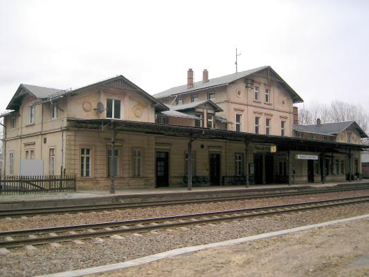 Bahnhof Neukirch-West selbst erstellt und auf veröffentlicht